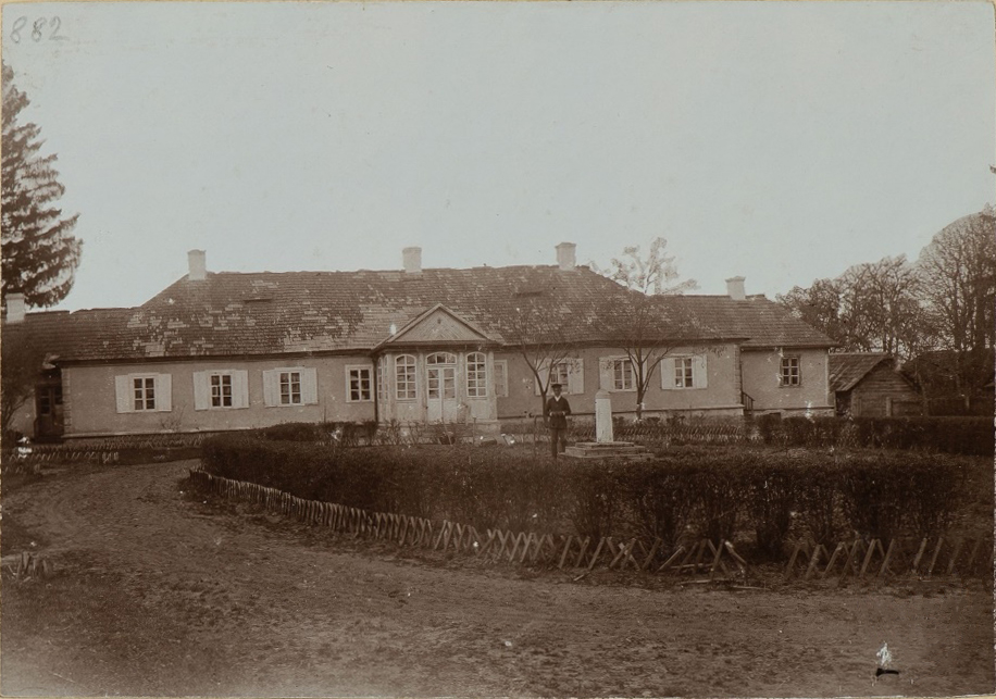 Беларуская (тарашкевіца): Штабін (Štabin), сядзіба неідэнтыфікаванага шляхецкага роду